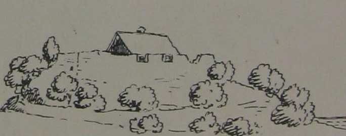 Zeichnung der Nellenburg